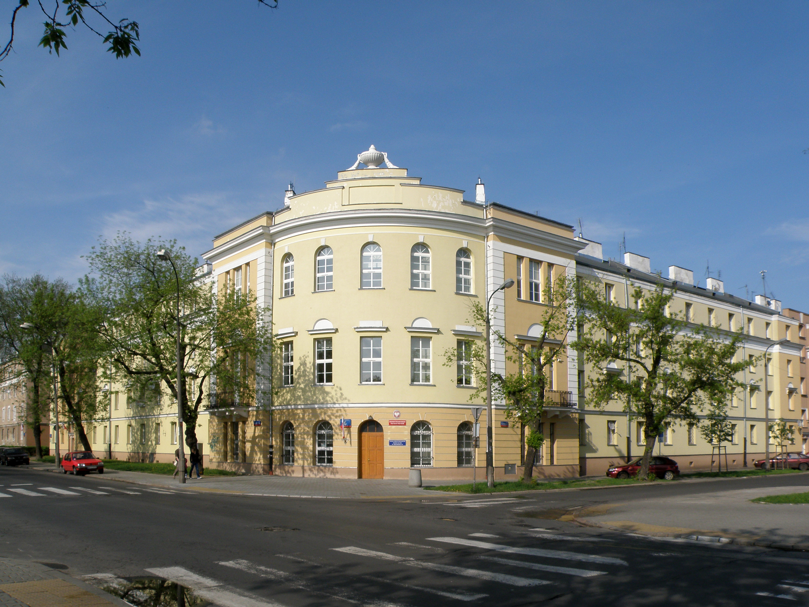 Warszawa, ul. Podskarbińska / ul. Kobielska